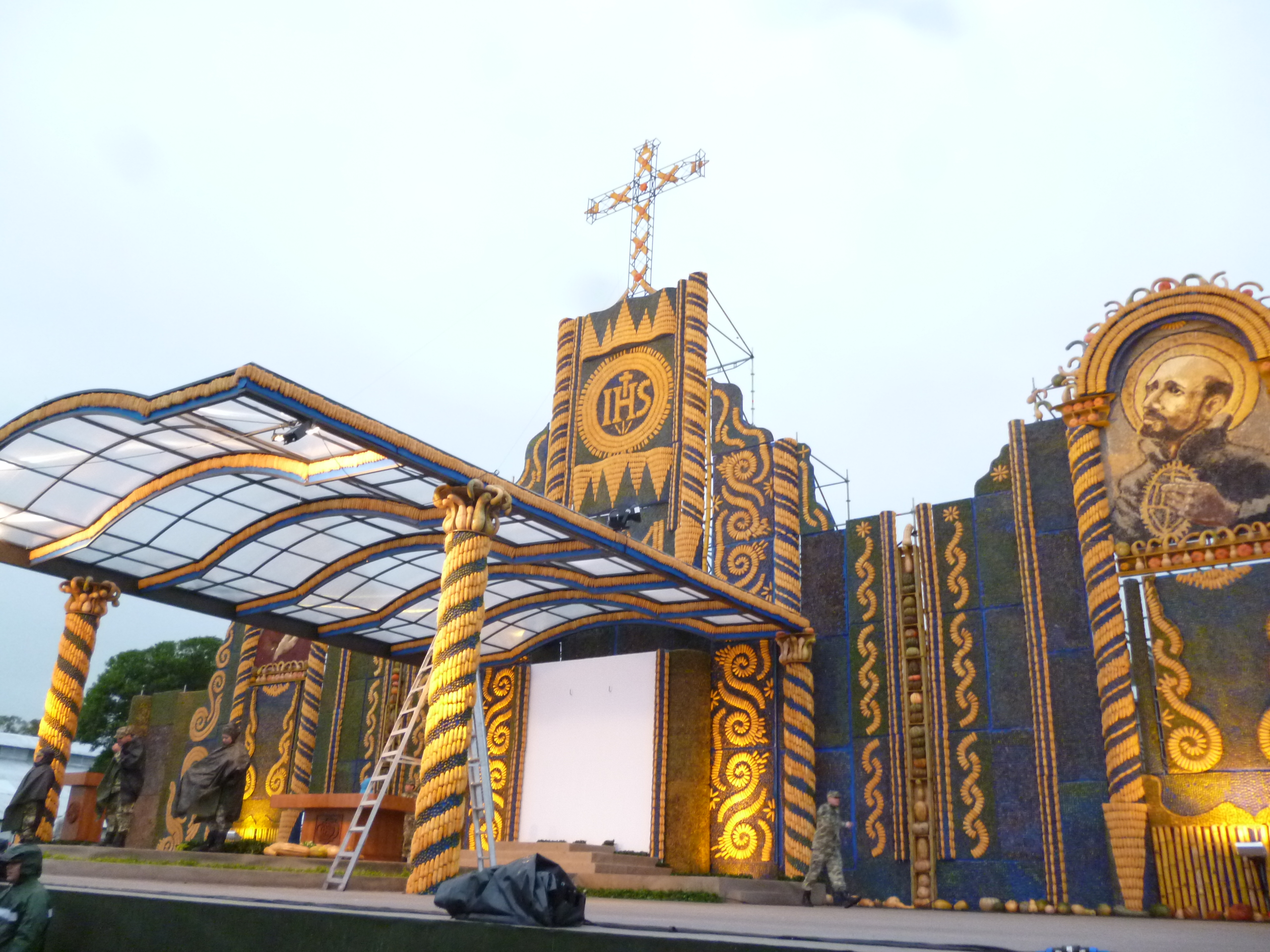 Plano contrapicado del retablo hecho de maíz, calabazas y cocos, elaborado por el artista plástico paraguayo Koki Ruiz y equipo de colaboradores. El altar sirvió de escenario para la misa central del Papa Francisco, el domingo 12 de julio de 2015, en Ñu Guasú, Luque, Paraguay. Esta imagen corresponde al martes 14 de julio de 2015, día anterior a su desmantelación.